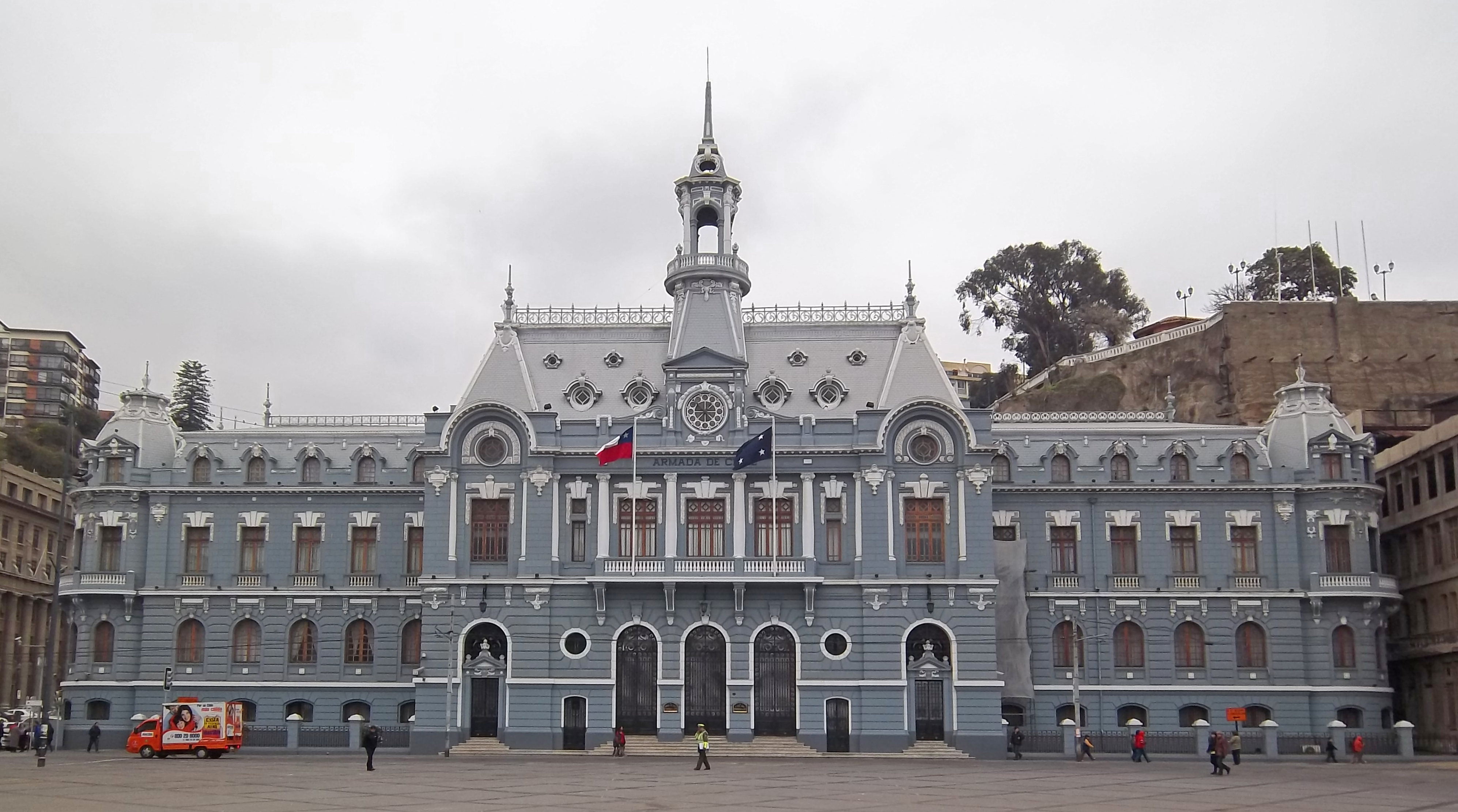 Edificio de la Comandancia en Jefe de la Armada en Valparaíso, Región de Valparaíso, Chile.